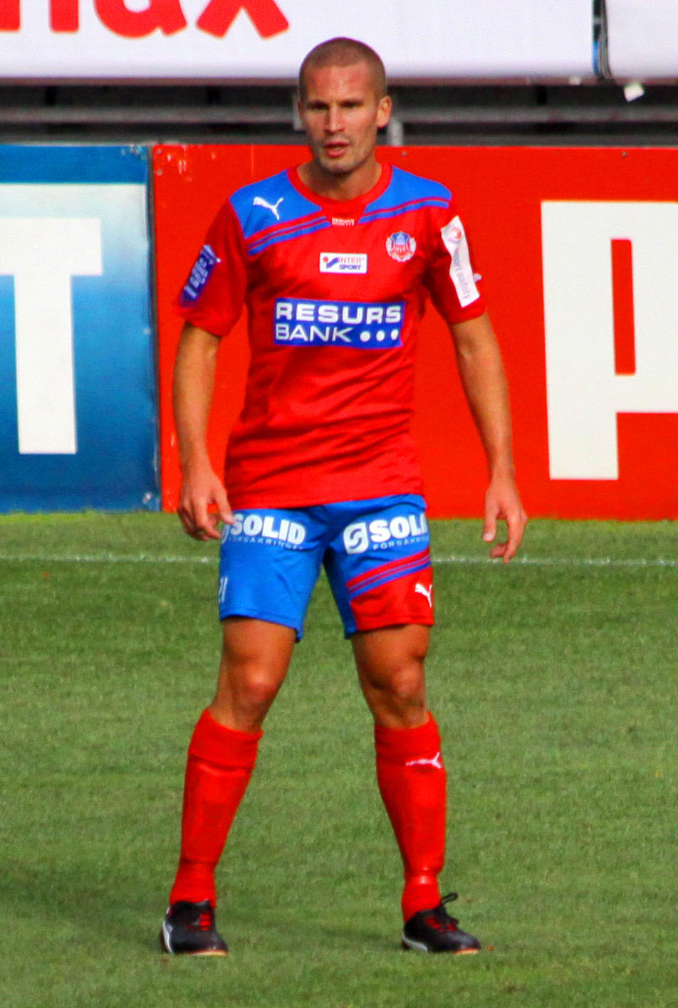 Christoffer Andersson